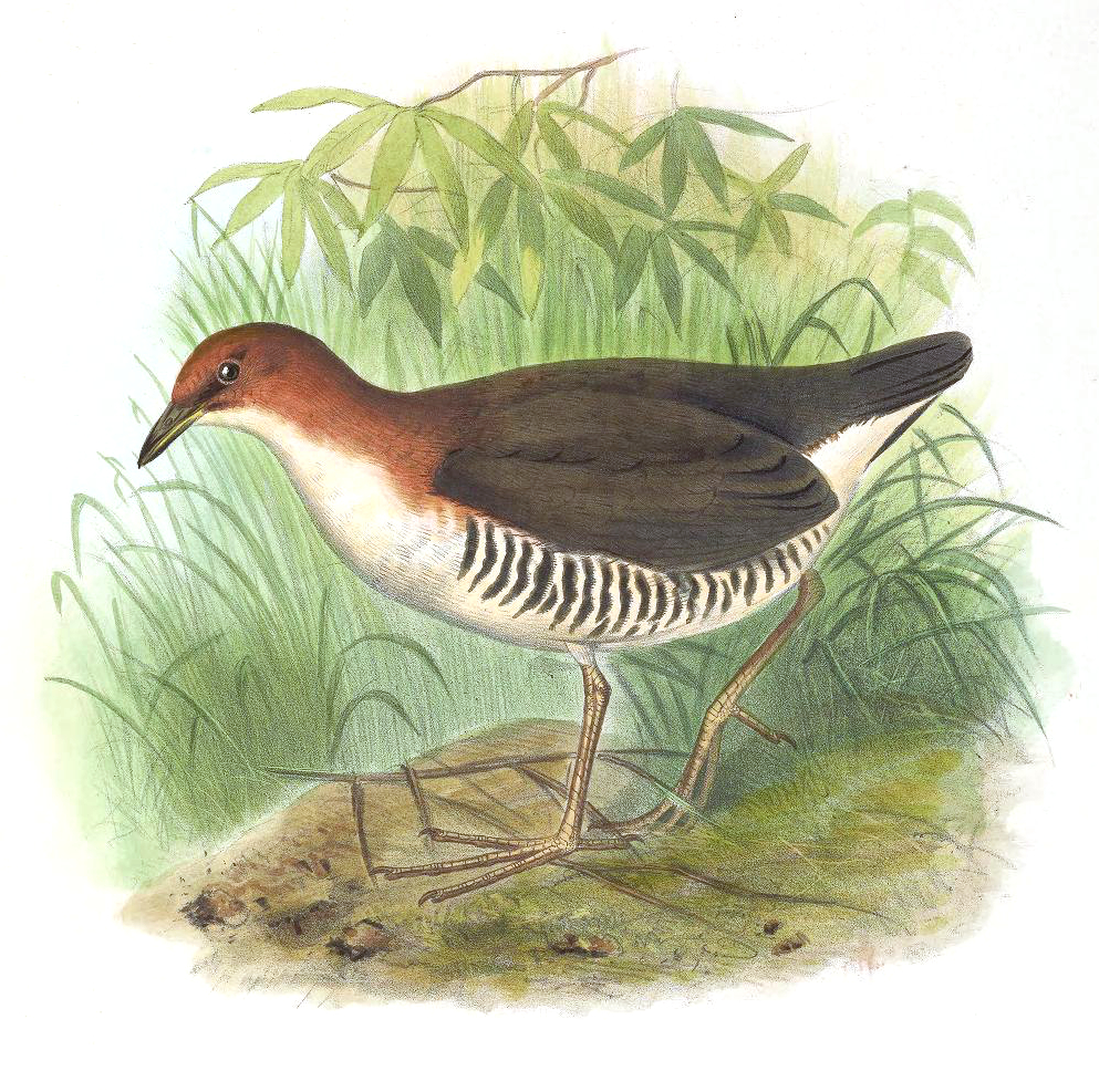 Porzana leucopyrrha =Laterallus leucopyrrhus